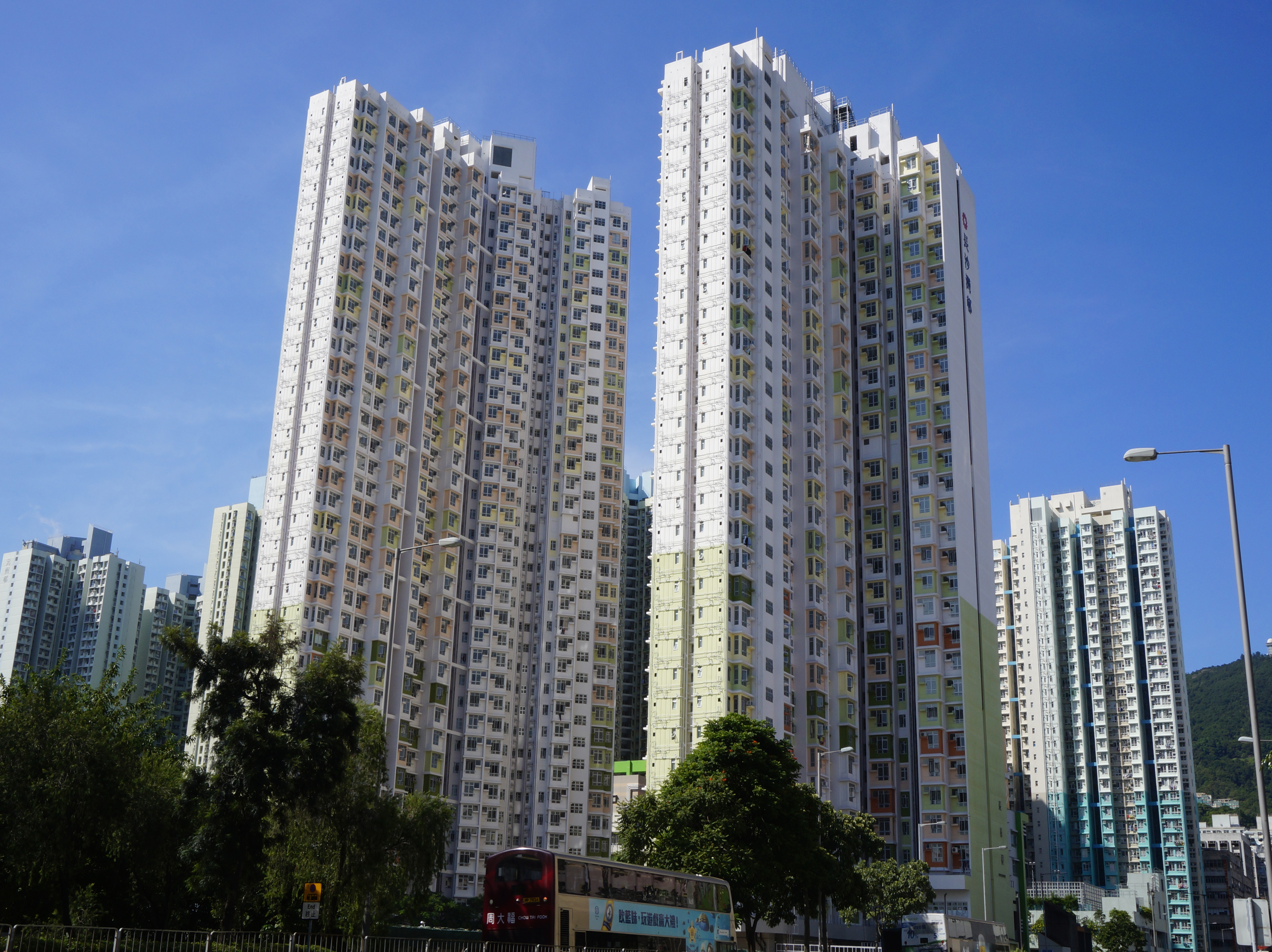 長沙灣邨長欣樓及長泰樓